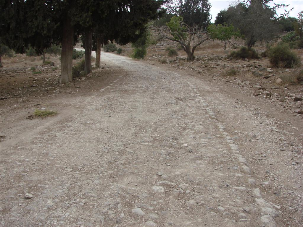 דרך סולינג ממבוא חורון לפרק קנדה